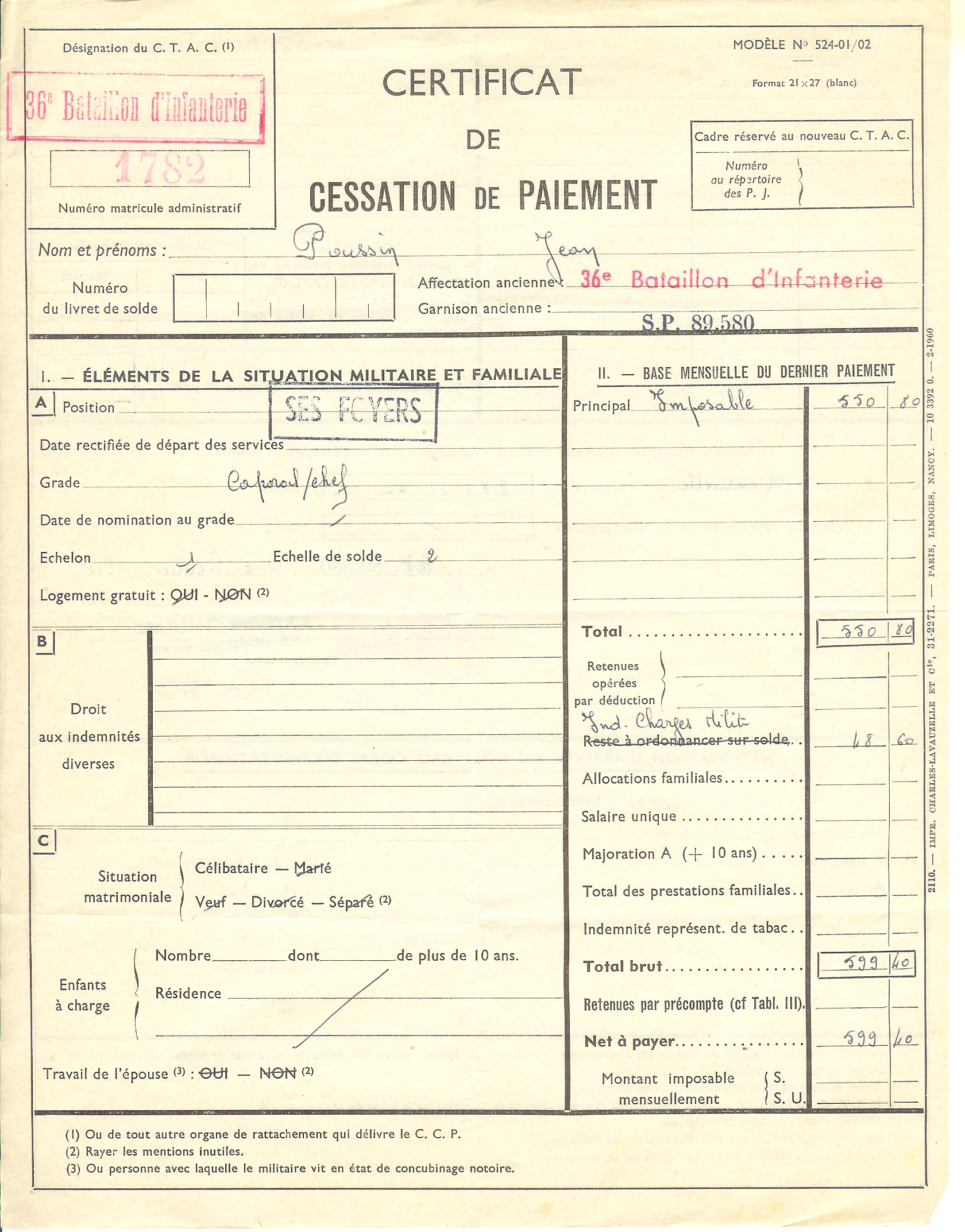 copie d'un bulletin de paie d'un appelé, maintenu en Algérie en février 1962